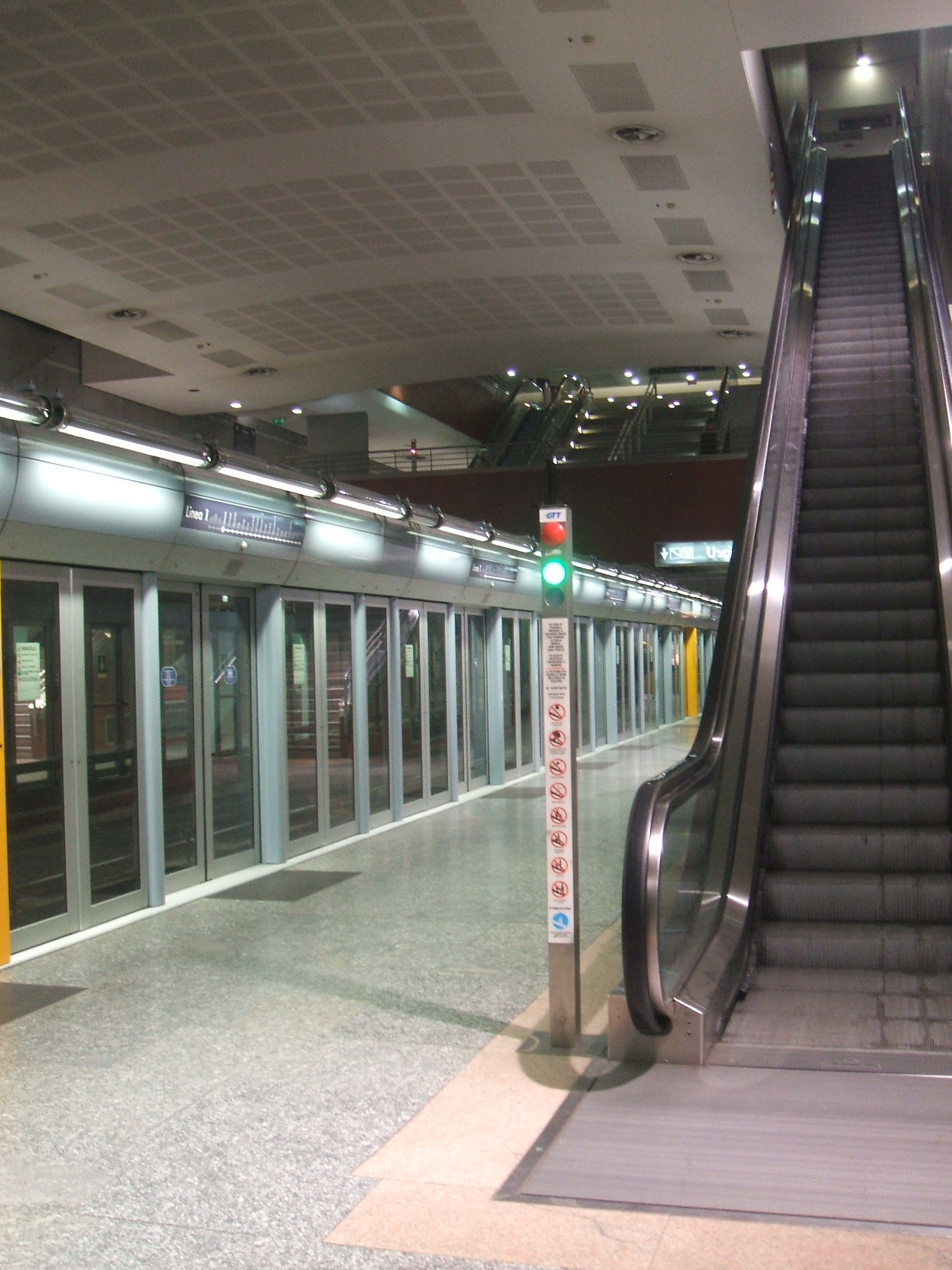 Stazione della metropolitana di Torino (Stazione: Piazza Massaua)Piemontèis: Stassion d'la Metropolitan-a ëd Turin (Stassion: Piassa Massaua)